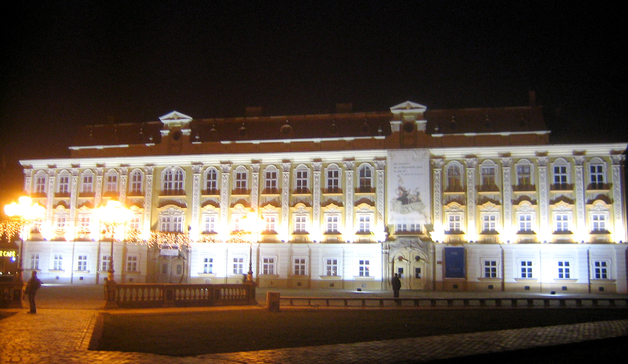 Palatul Baroc care găzduiește Muzeul de Artă Timișoara